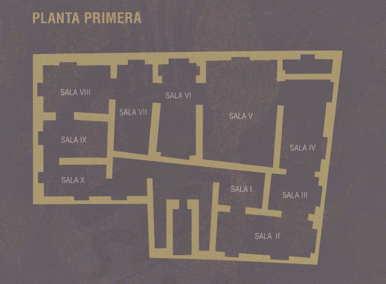 La ilustración muestra la disposición de las 10 salas que componen la planta primera del museo monográfico de Arte Ibérico. Cada una de ellas está dedicada a un tema socio-cultural del mundo ibérico, exhibiéndose los importantes ajuares hallados en las más de 500 tumbas de la necrópolis de El Cigarralejo.